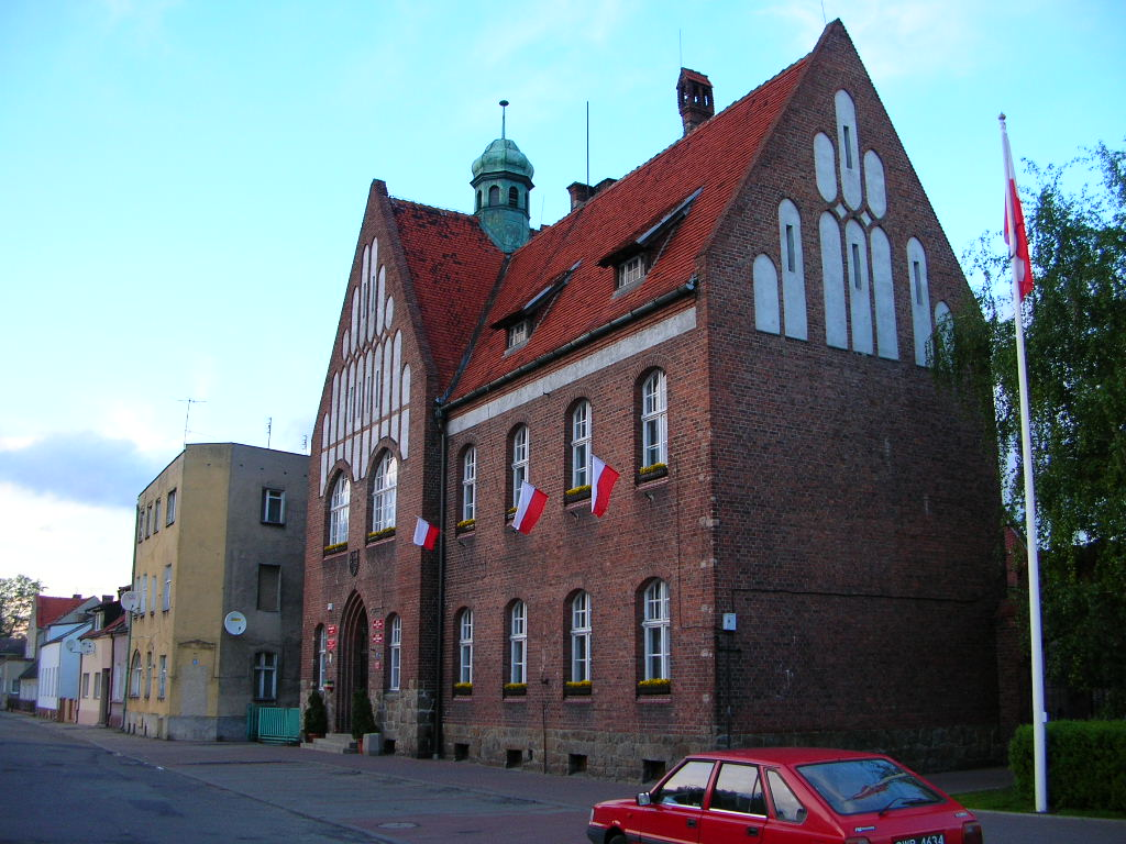 Witnica - Urząd Miasta i Gminy